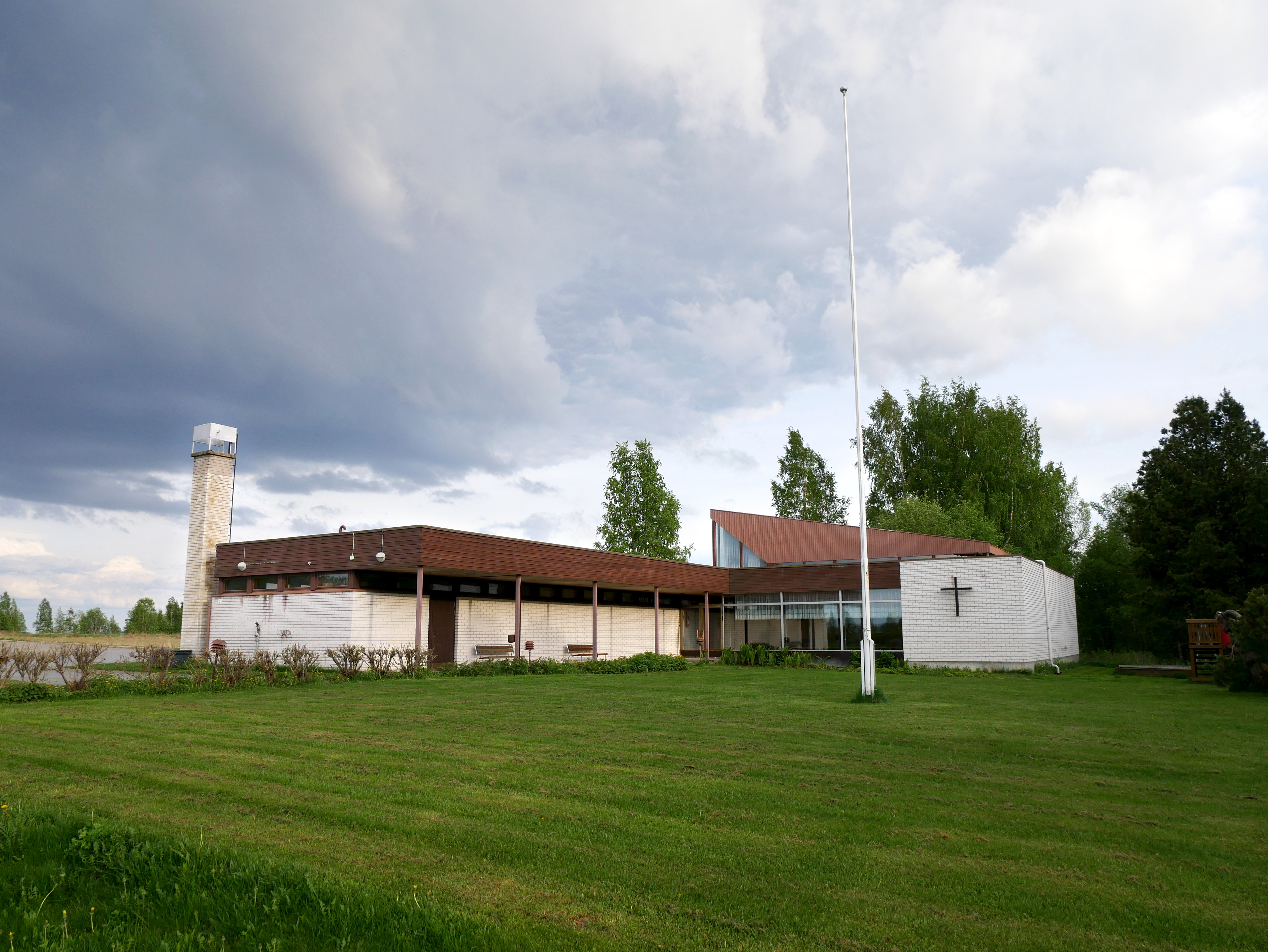 Lappajärven vuonna 1971 valmistunut seurakuntatalo jonka on suunnitellut arkkitehti Erkko Virkkunen.